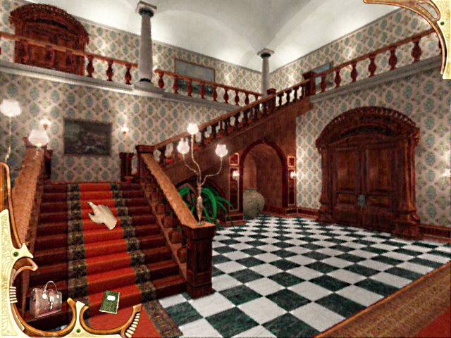 Capture d'écran du jeu Sherlock Holmes : le Mystère de la momie, donnant une idée du gameplay du jeu.